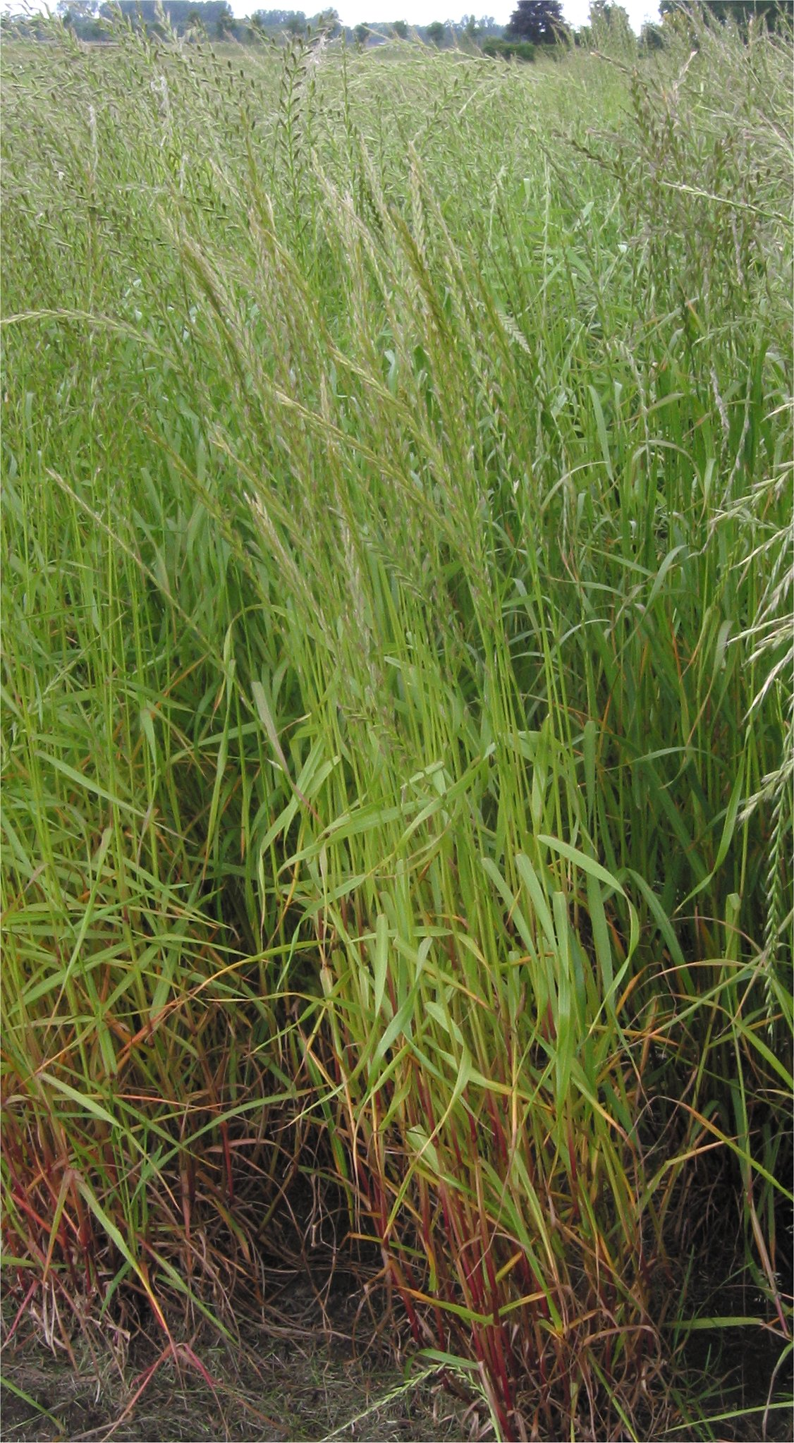 (Italiaans raaigras) Lolium multiflorum